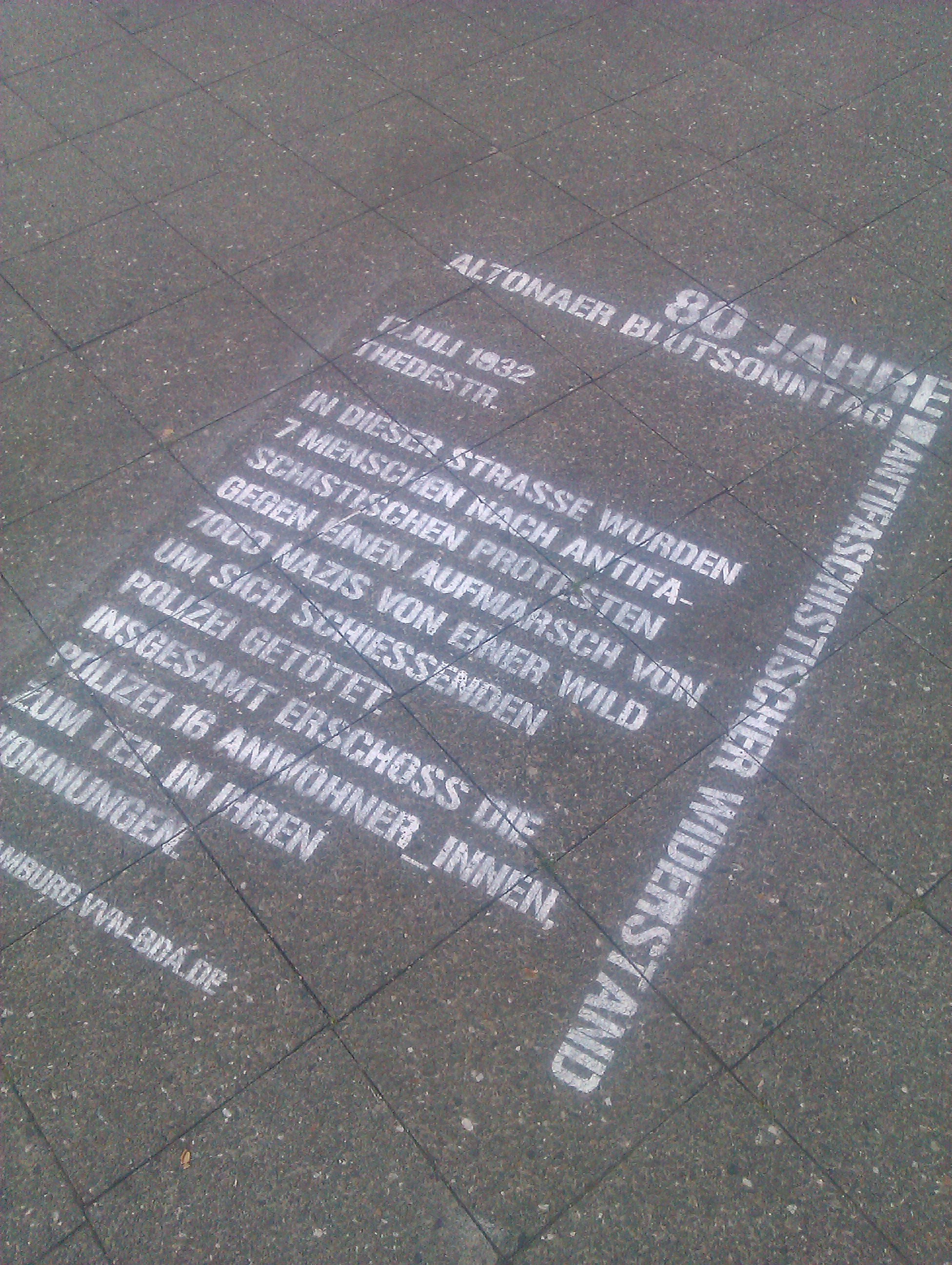 Guerilla "Denkmal" als Erinnerung an den 17. Juli 1932 (gesehen im August 2012 Großer Bergstraße)